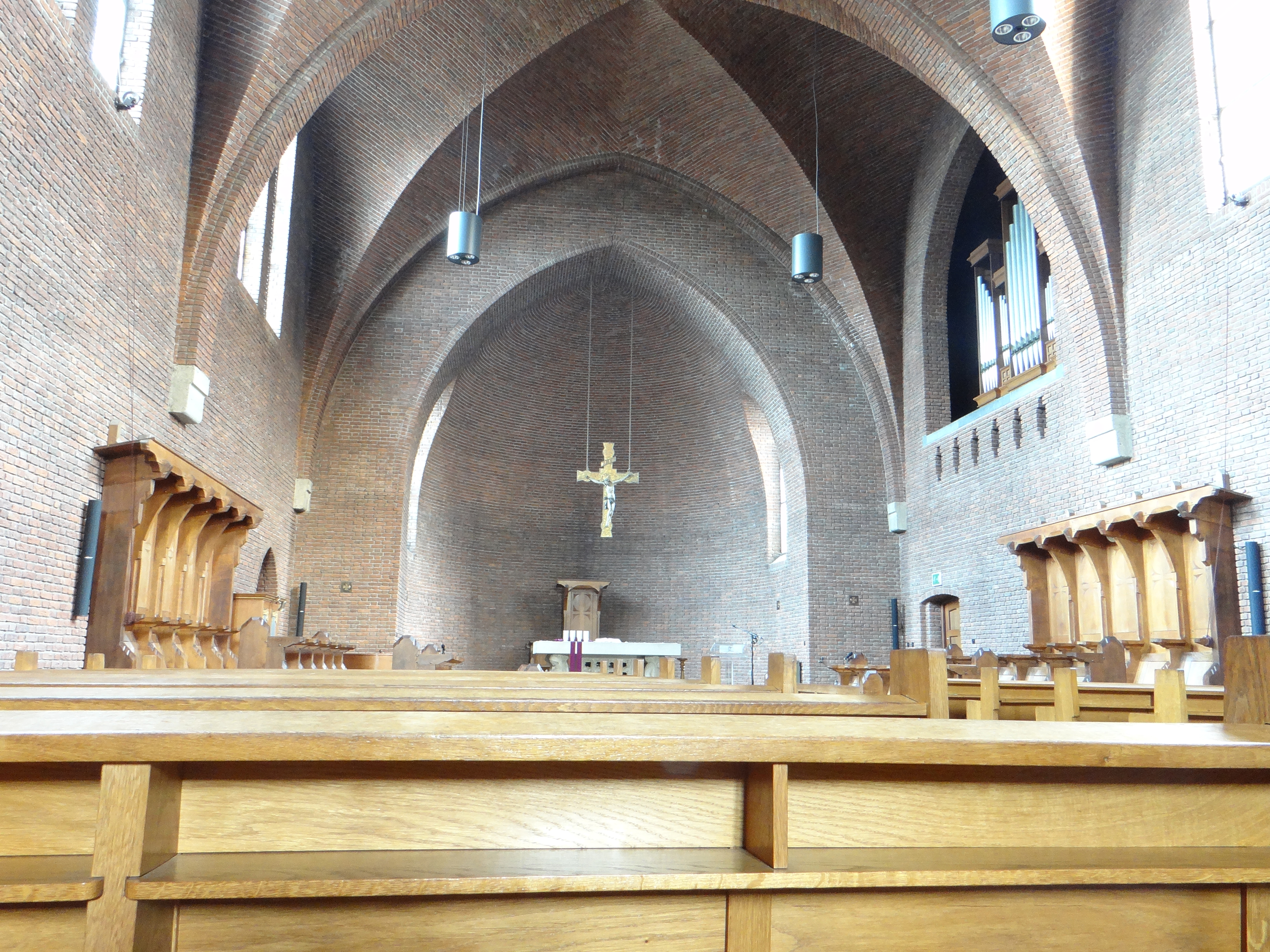 Abdij van Egmond